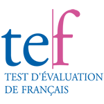 Test d'Evaluation du Français